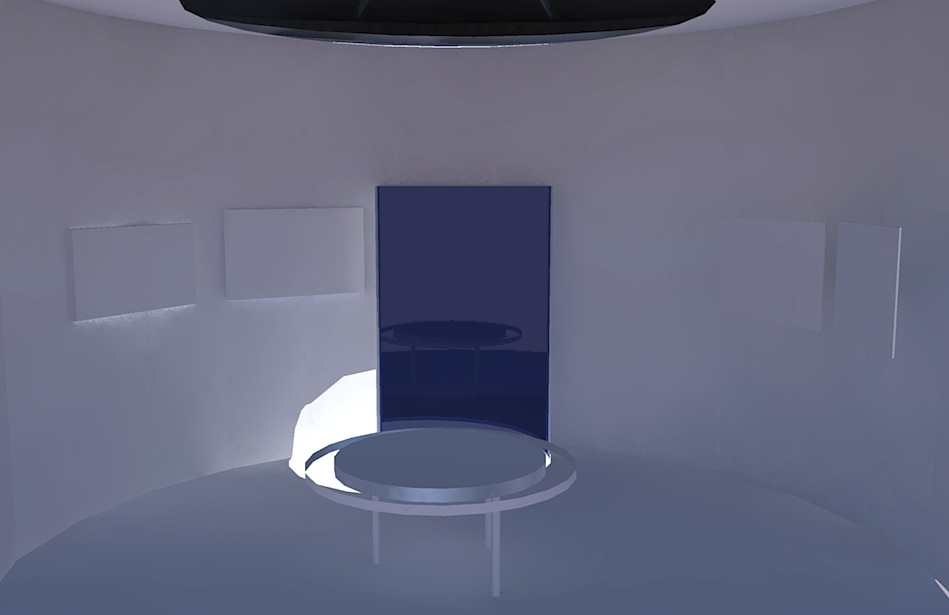 Template:Screenshotcopyrighted